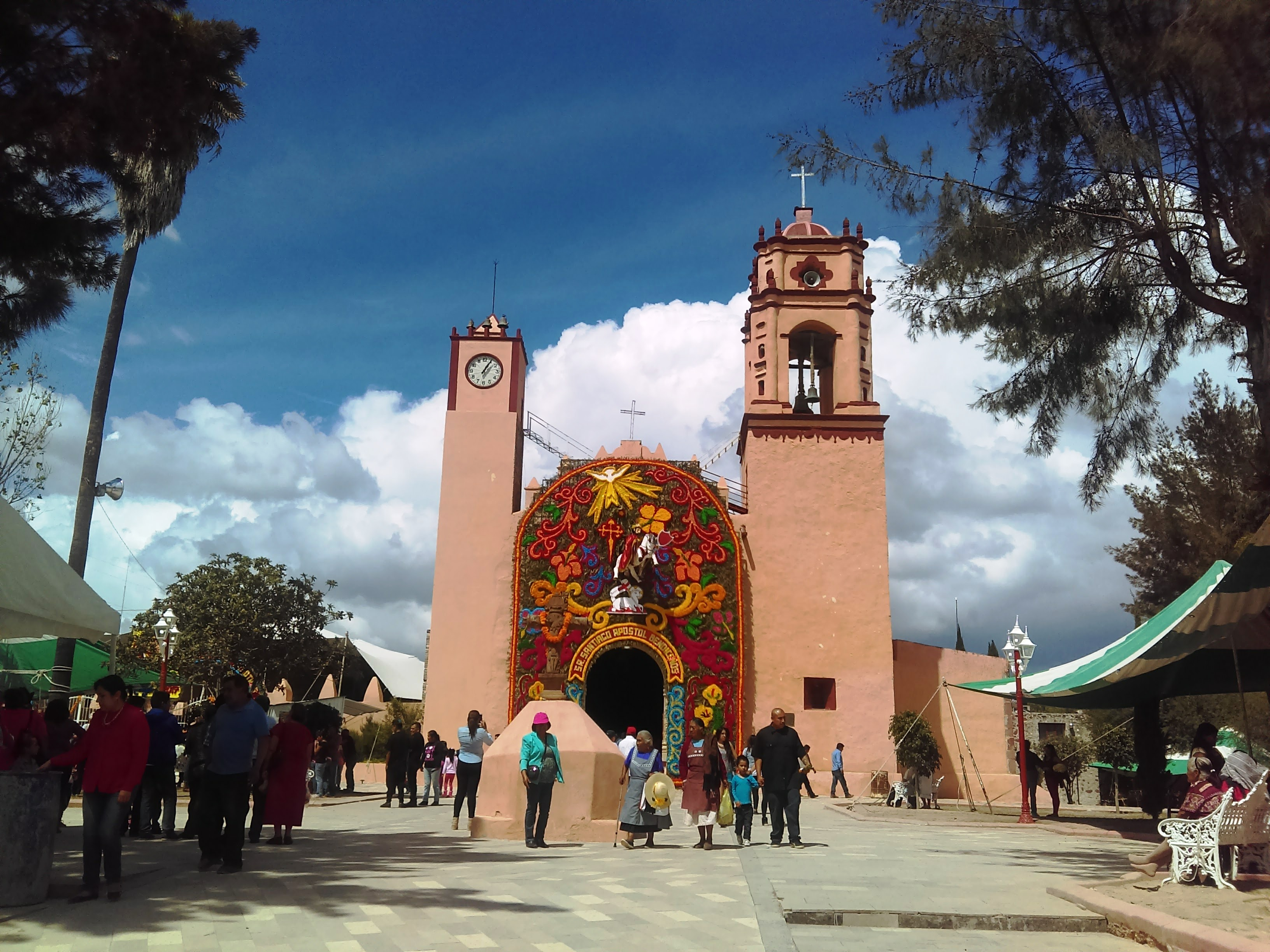 Santiago de Anaya, Hidalgo